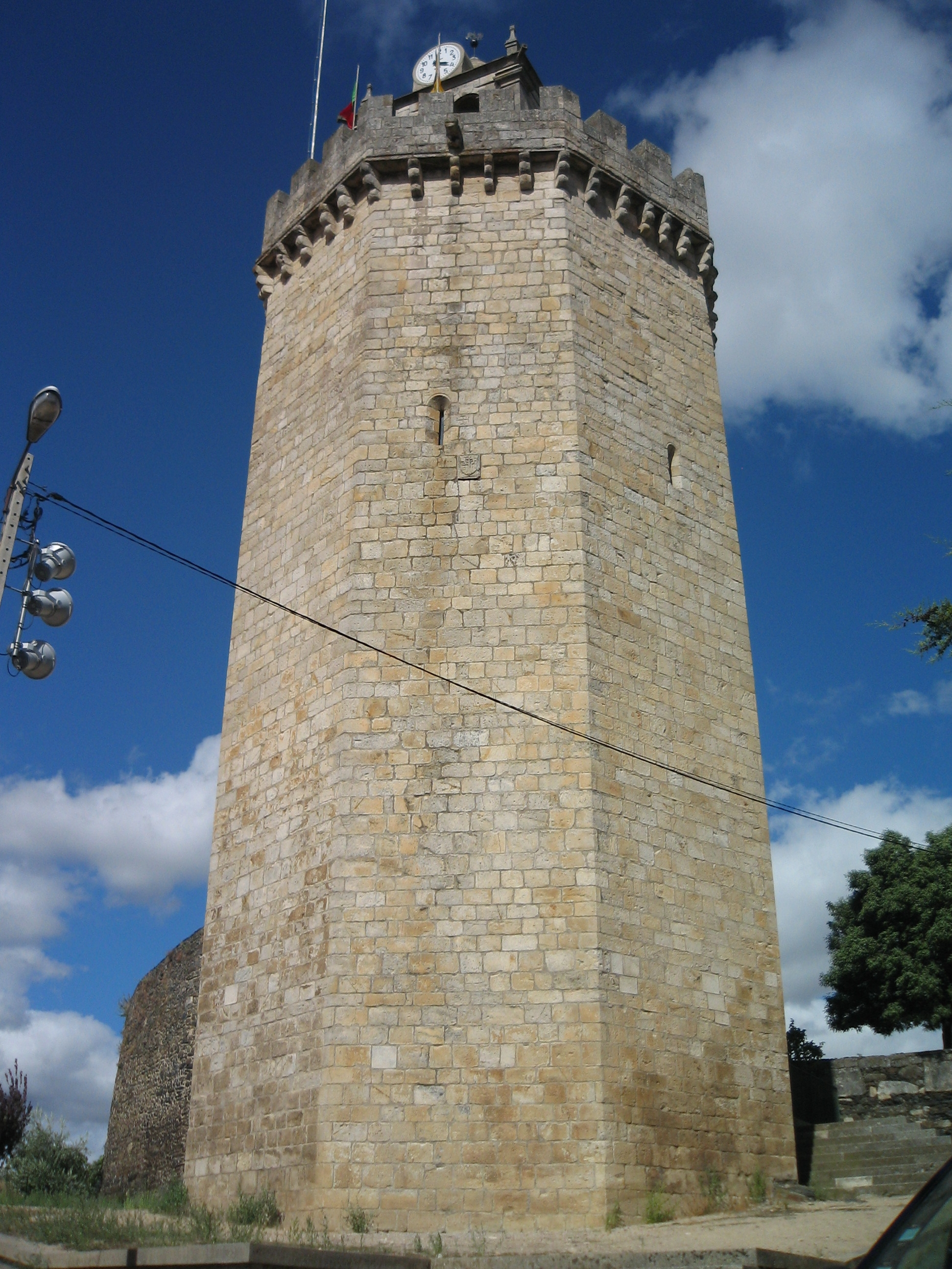 Torre de Menagem em Freixo de Espada a Cinta. Distrito de Bragança. This monument is classified as Monumento Nacional. This file was uploaded for Wiki Loves Monuments in Portugal with the unique identifier 70453.